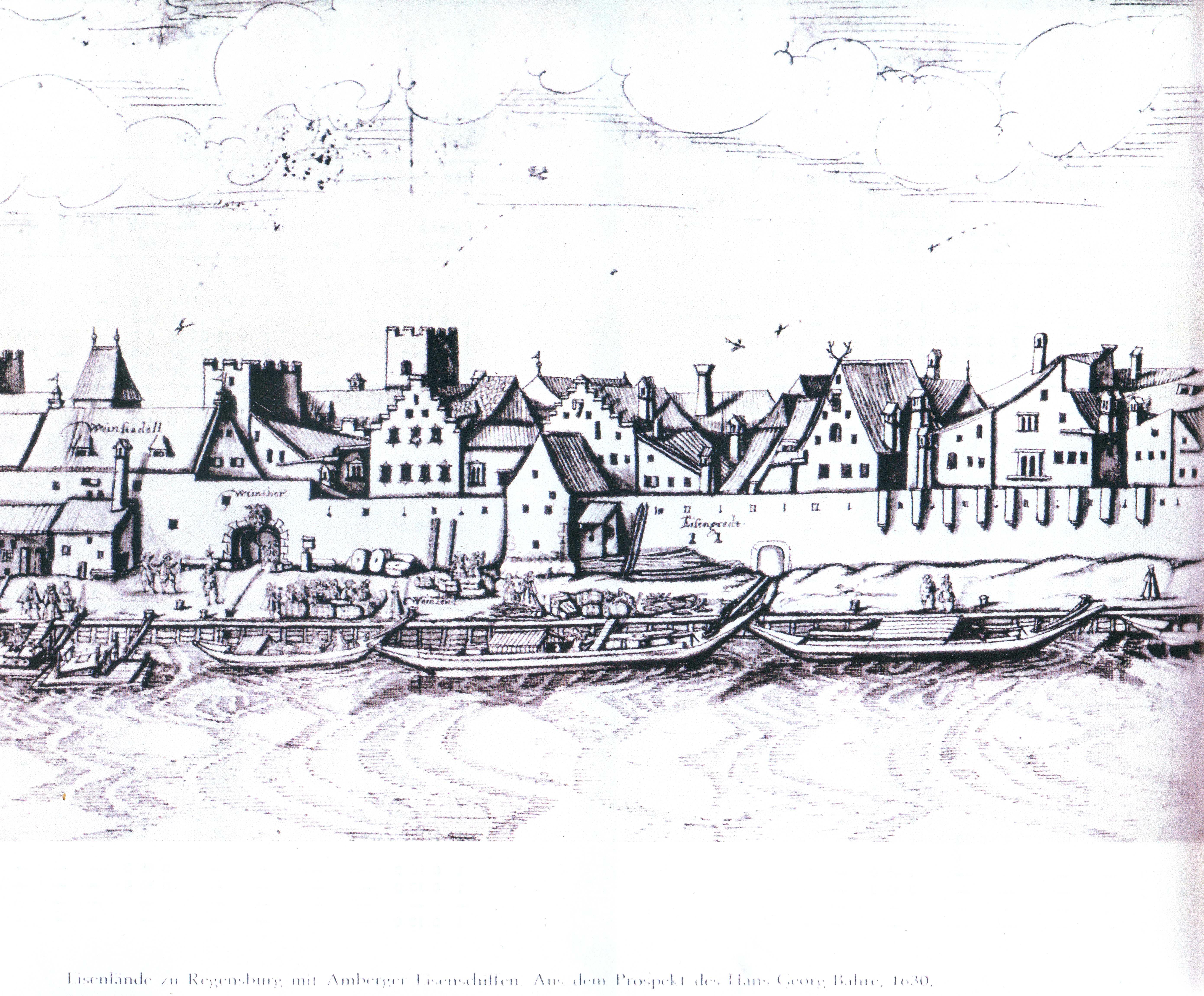 Eisenlände zu Regensburg mit Amberger Schiffen